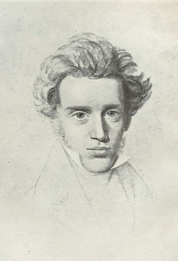 Drawing of Søren Kierkegaard. The Frederiksborg Museum.